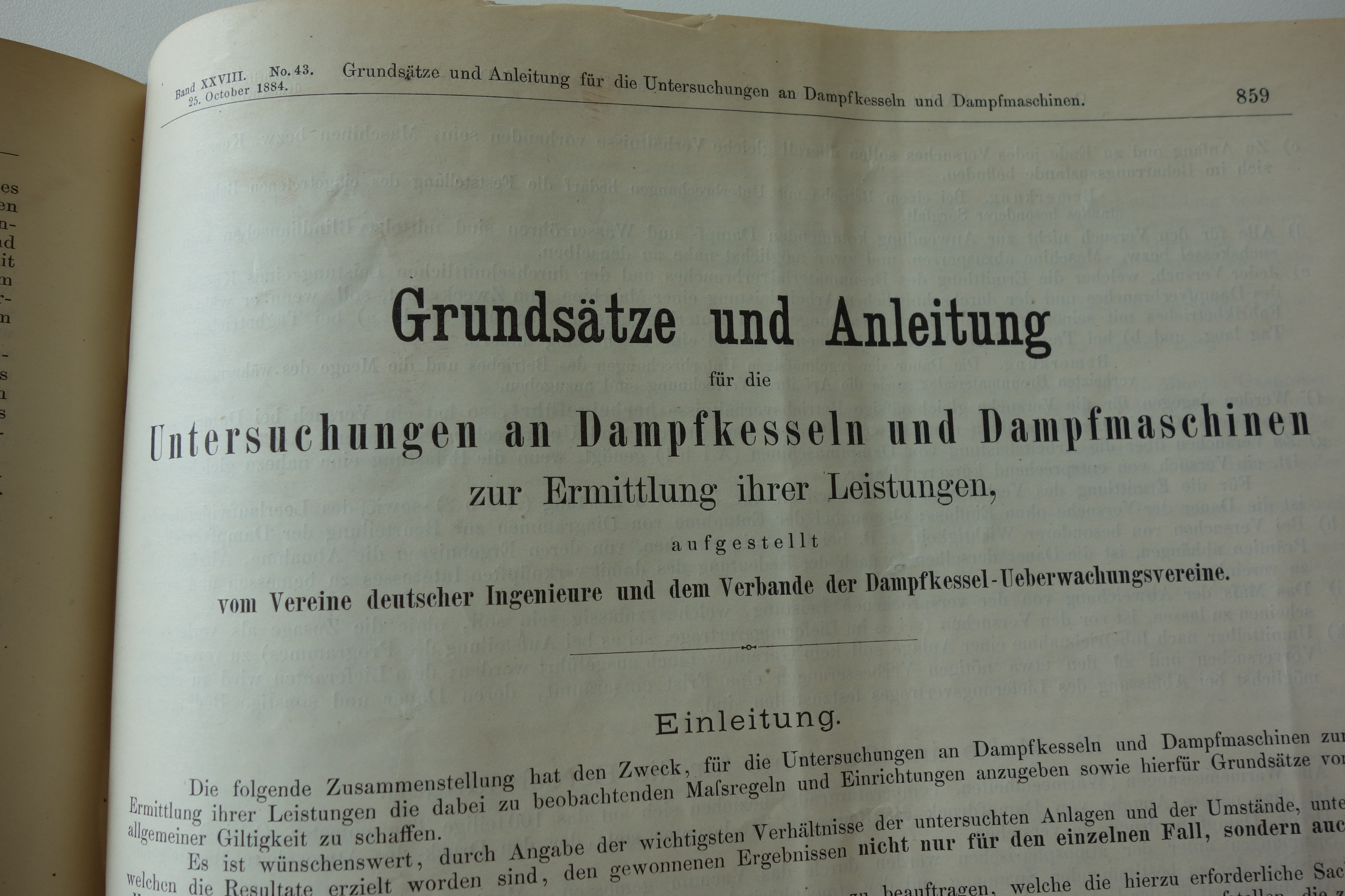 Ausschnitt aus der "Zeitschrift des Vereines deutscher Ingenieure" vom 25. Oktober 1884, welche die erste VDI-Richtlinie enthält. Deren Titel lautete "Grundsätze und Anleitungen für die Untersuchungen an Dampfkesseln und Dampfmaschinen zur Ermittlung ihrer Leistungen".